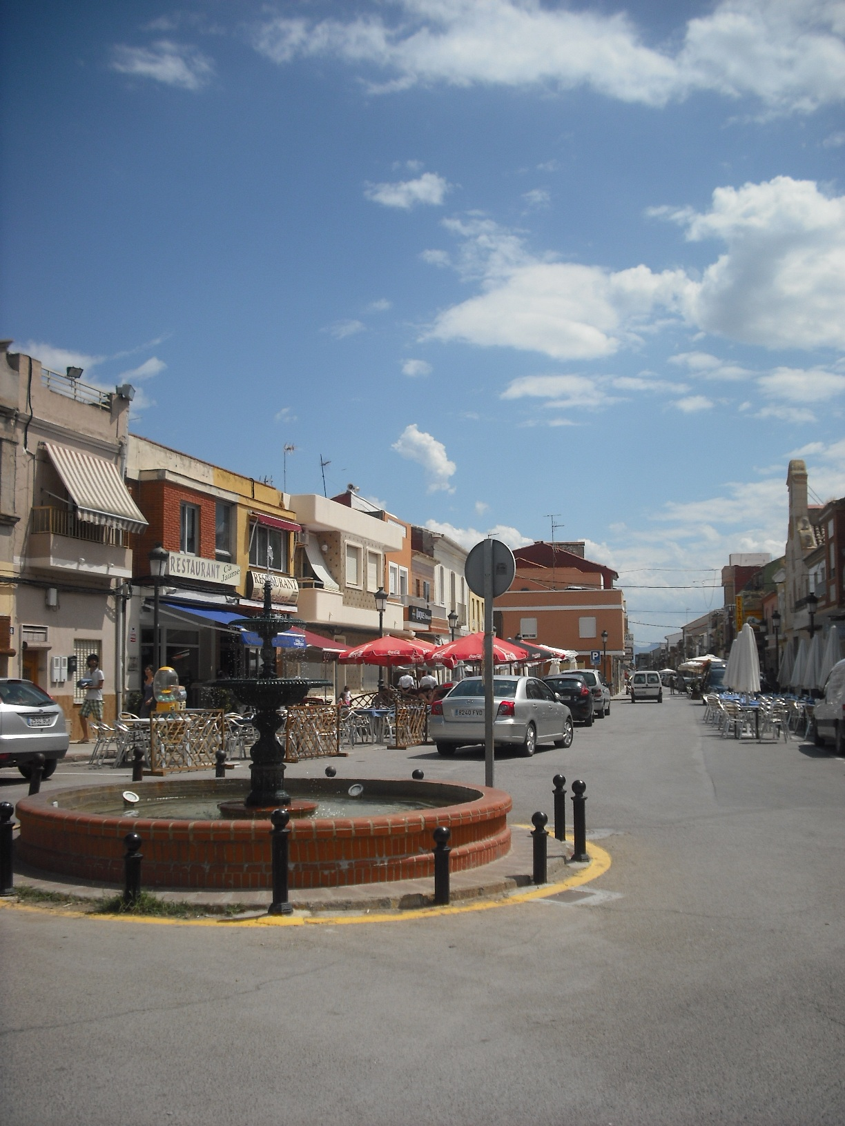 Plaça de la Sequiota del Palmar.